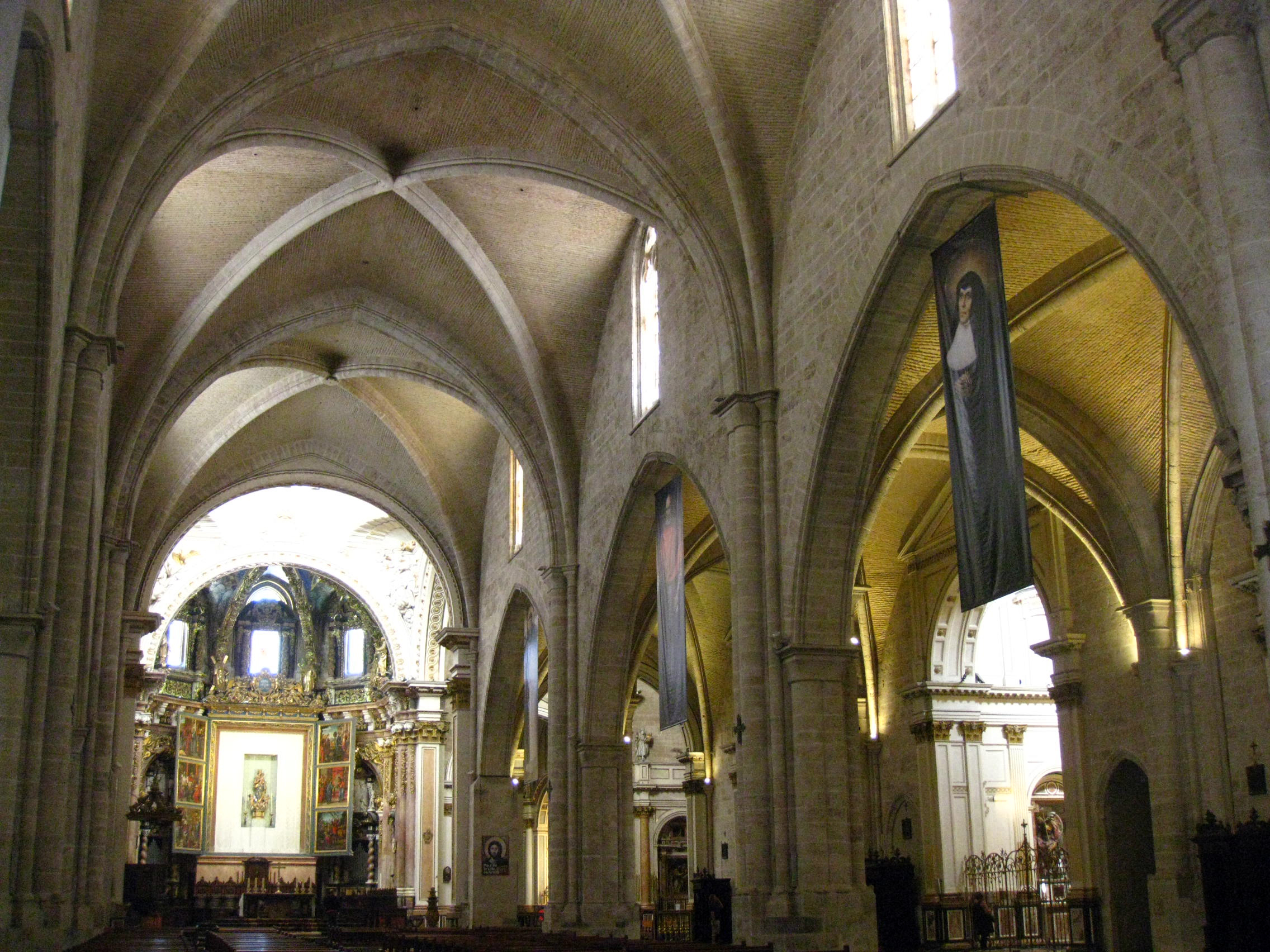 Santa Església Catedral Basílica Metropolitana de Santa Maria (València)